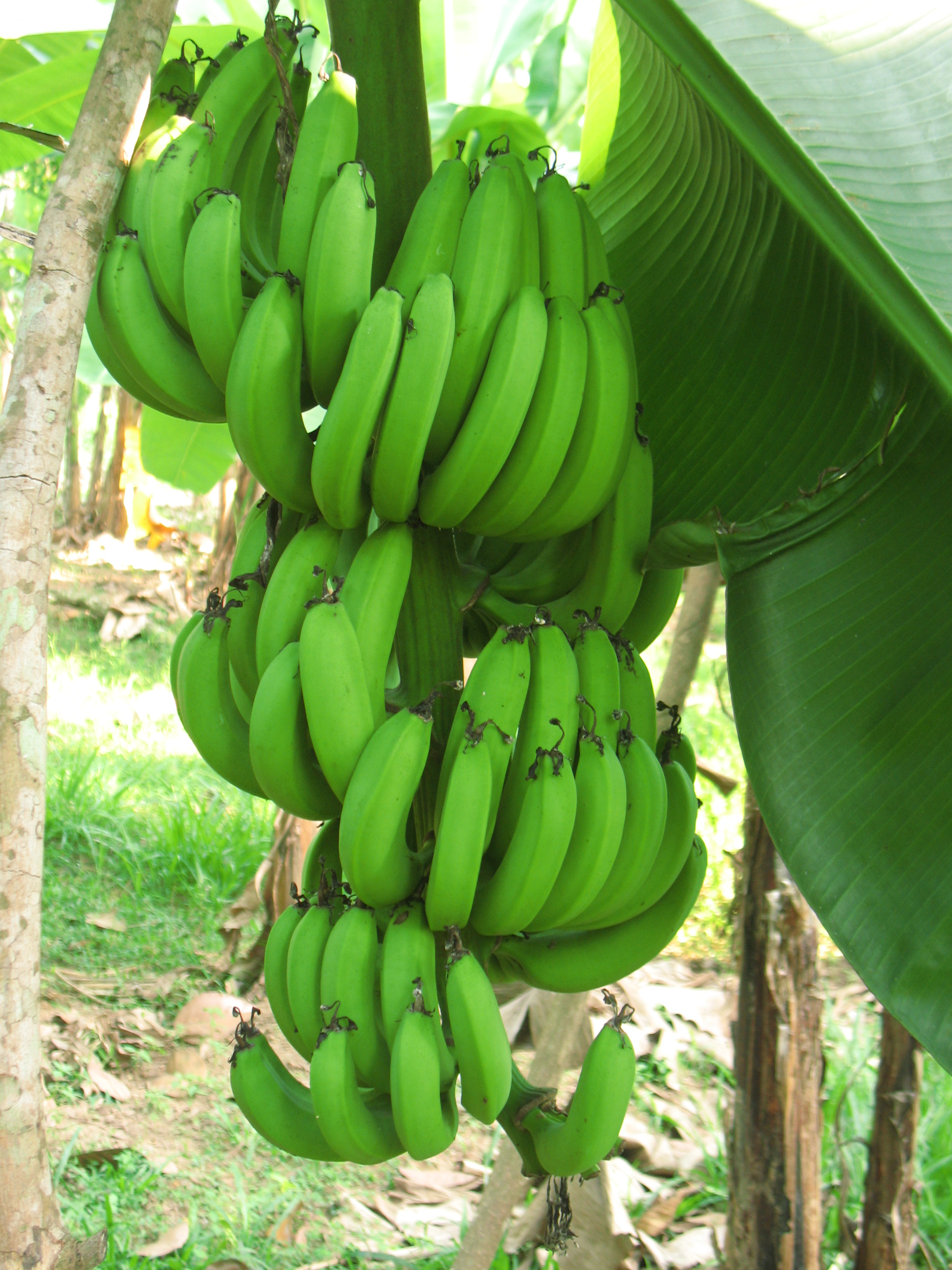 കൂമ്പ് ഒടിച്ചതിനുശേഷമുള്ള വാഴക്കുല